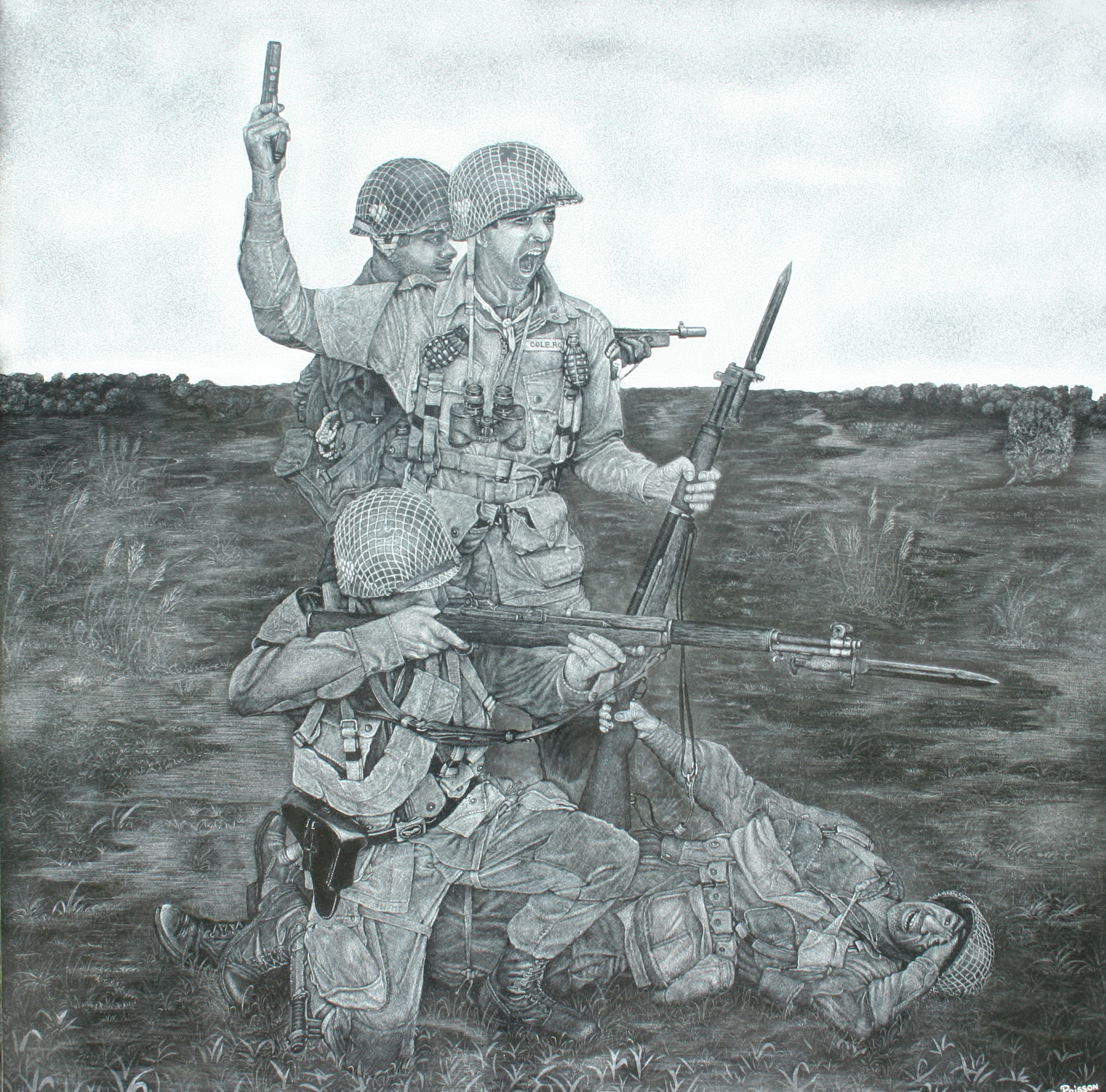 Monument commémoratif situé à Carentan (Manche) en l'honneur du lt-colonel Robert Cole